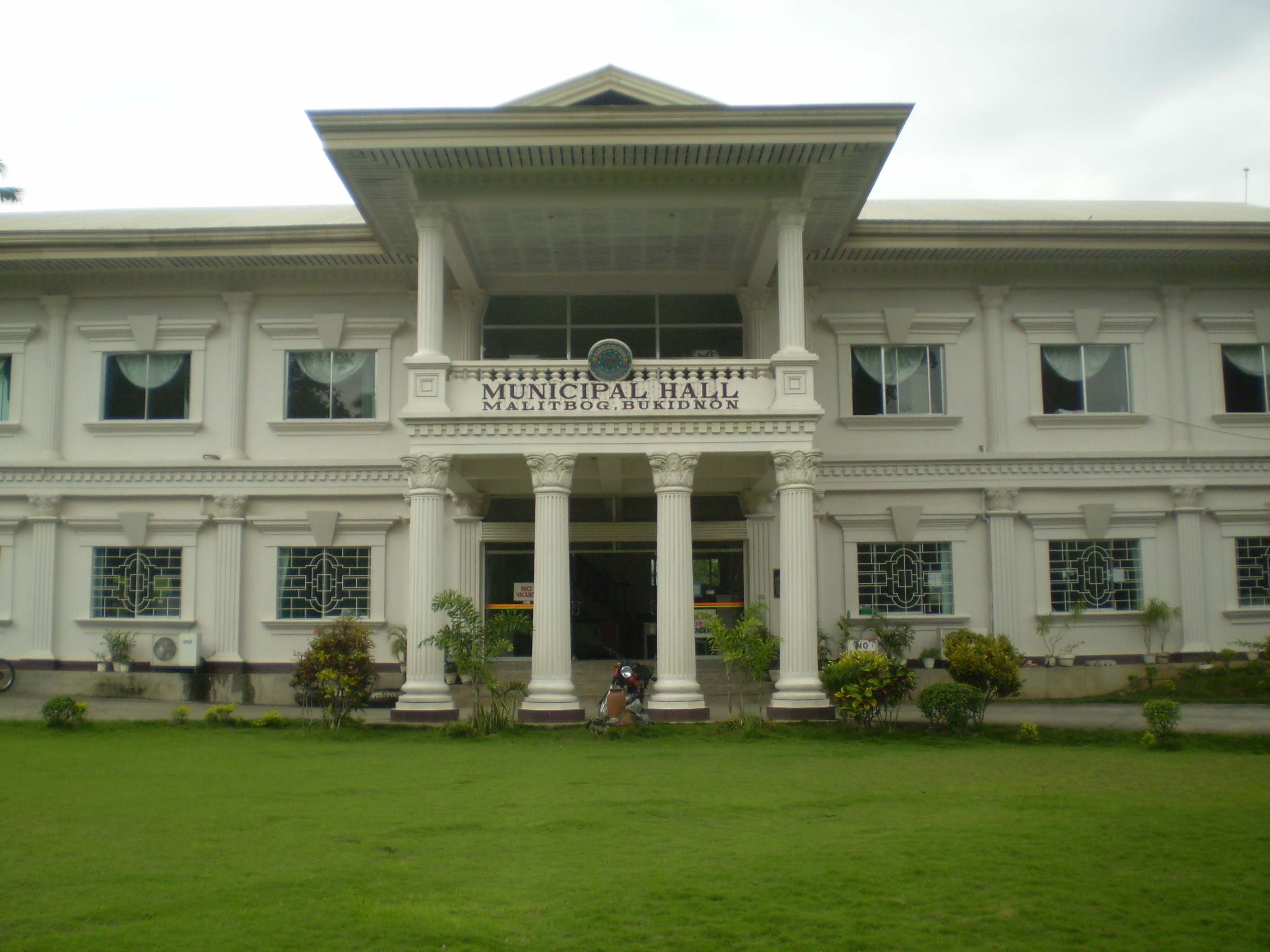 Municipal hall, Malitbog, Bukidnon